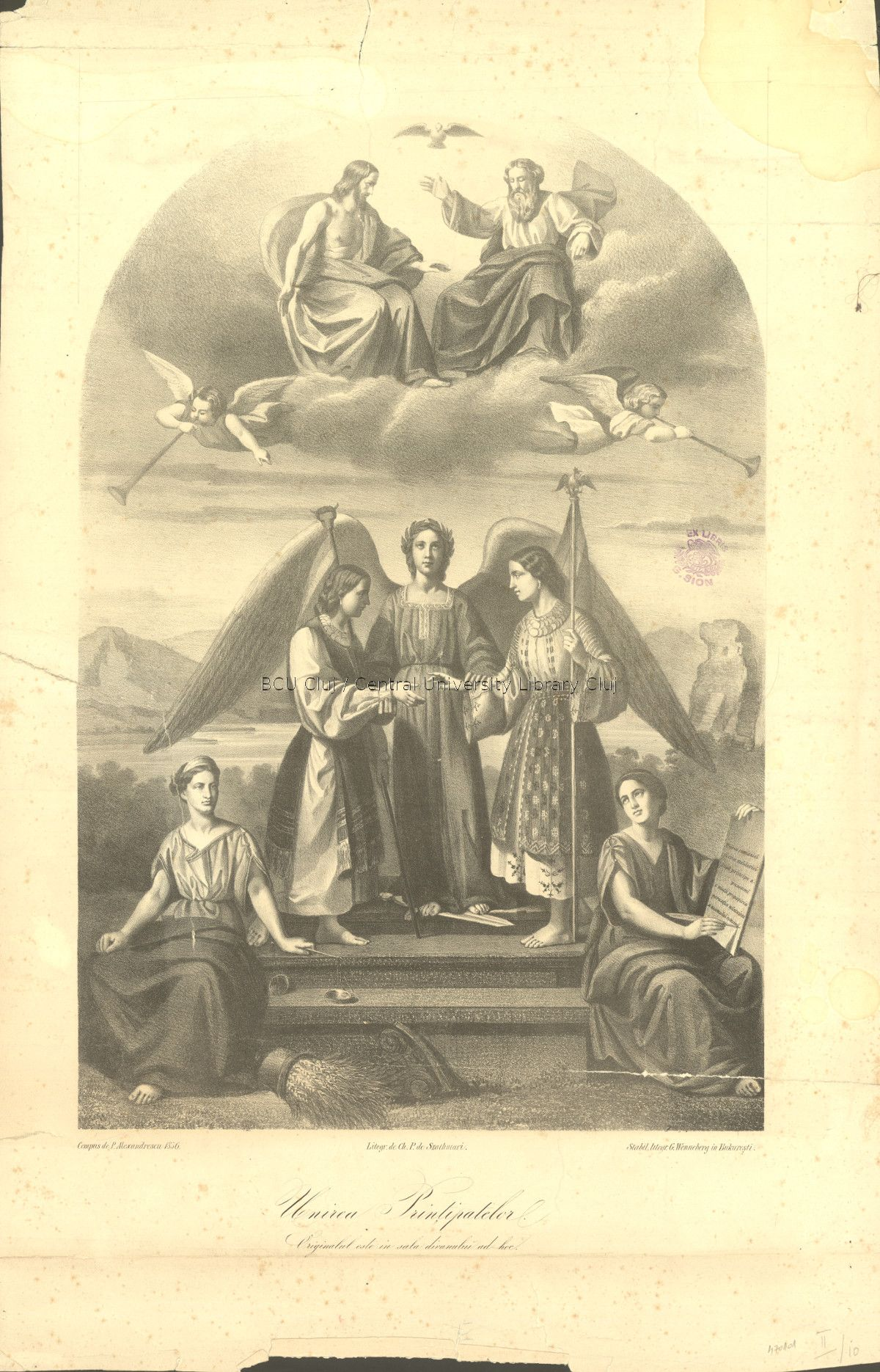 Unirea Principatelor [material iconografic] / compus de P. Alexandrescu ; litogr. de Ch. P. de Szathmari. - Bucureşti : stabil. litogr. G. Wonneberg, 1856. - Stampă ; 537x363 mm.